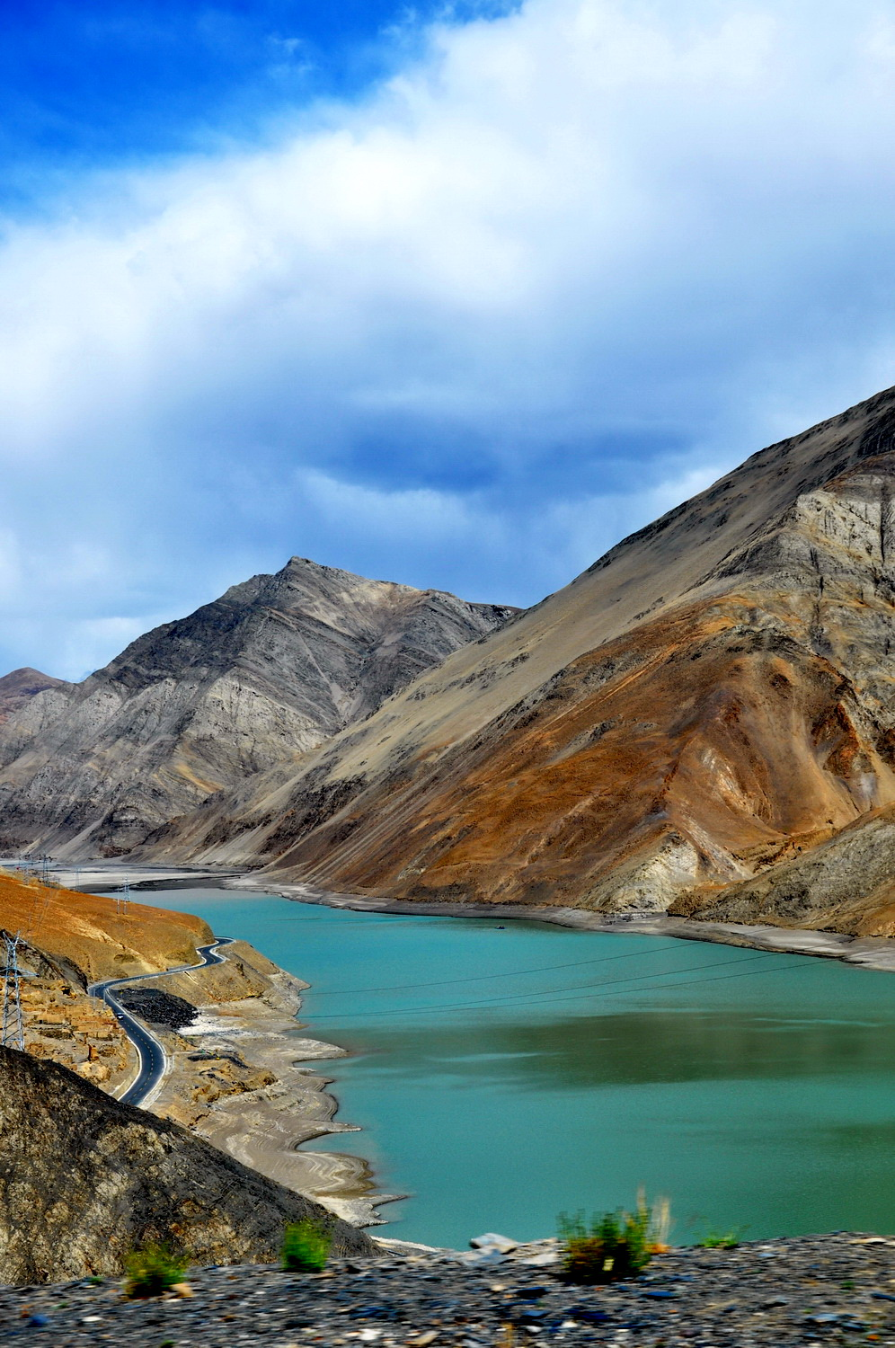 Tibet :lac Yamdrok Tso (4200m)